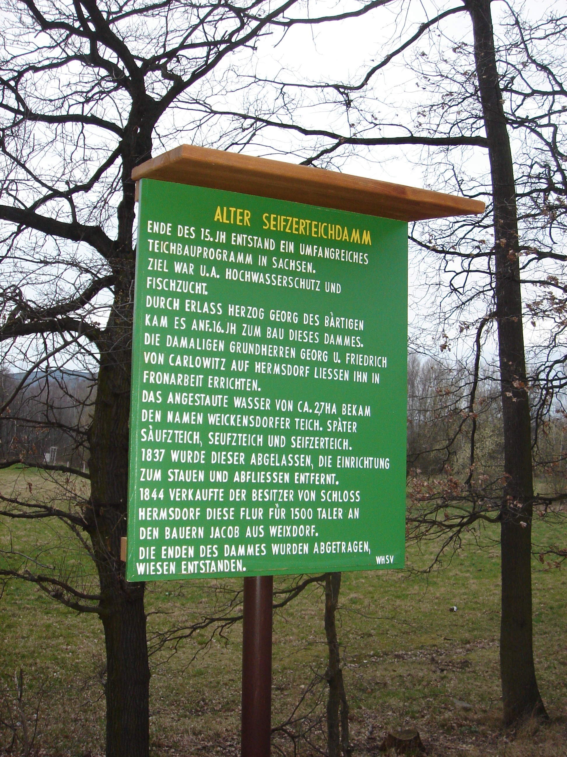 Infotafel Seifzerteichdamm, Weixdorf, Dresden